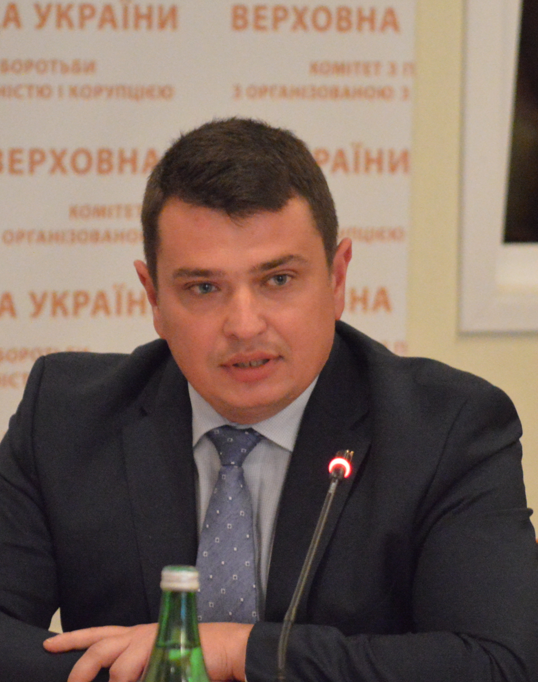 Директор Національного антикорупційного бюро України